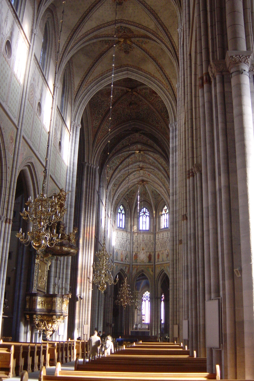 Kathedral zu Uppsala (Schweden).